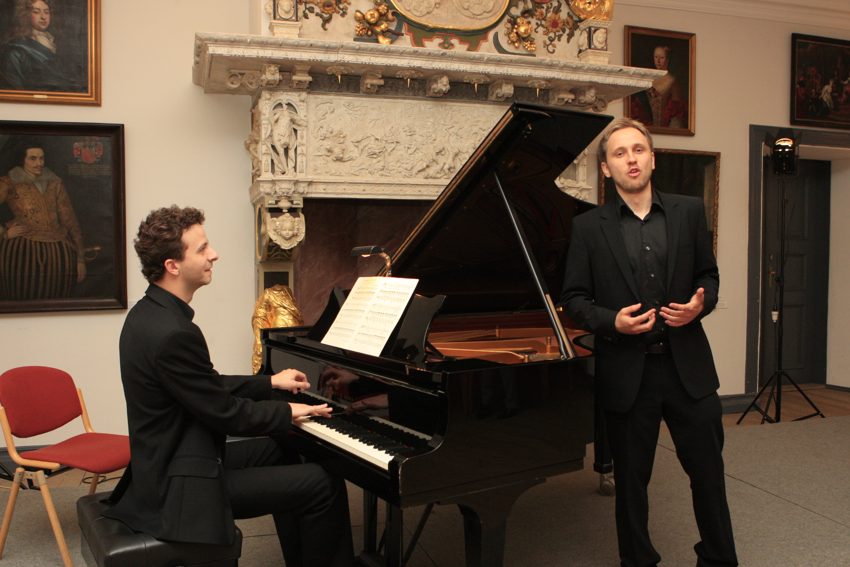 Rafael Fingerlos (Bariton) und Lech Napierala (Klavier) im Meisterkurs bei Charles Spencer (Pianist) und Ulf Bästlein im Schloss vor Husum.